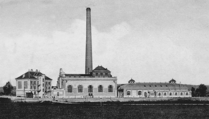 Tepelná (parní, respektive parostrojní) elektrárna v Českých Budějovicích založená 1907, vpravo garáže tramvají